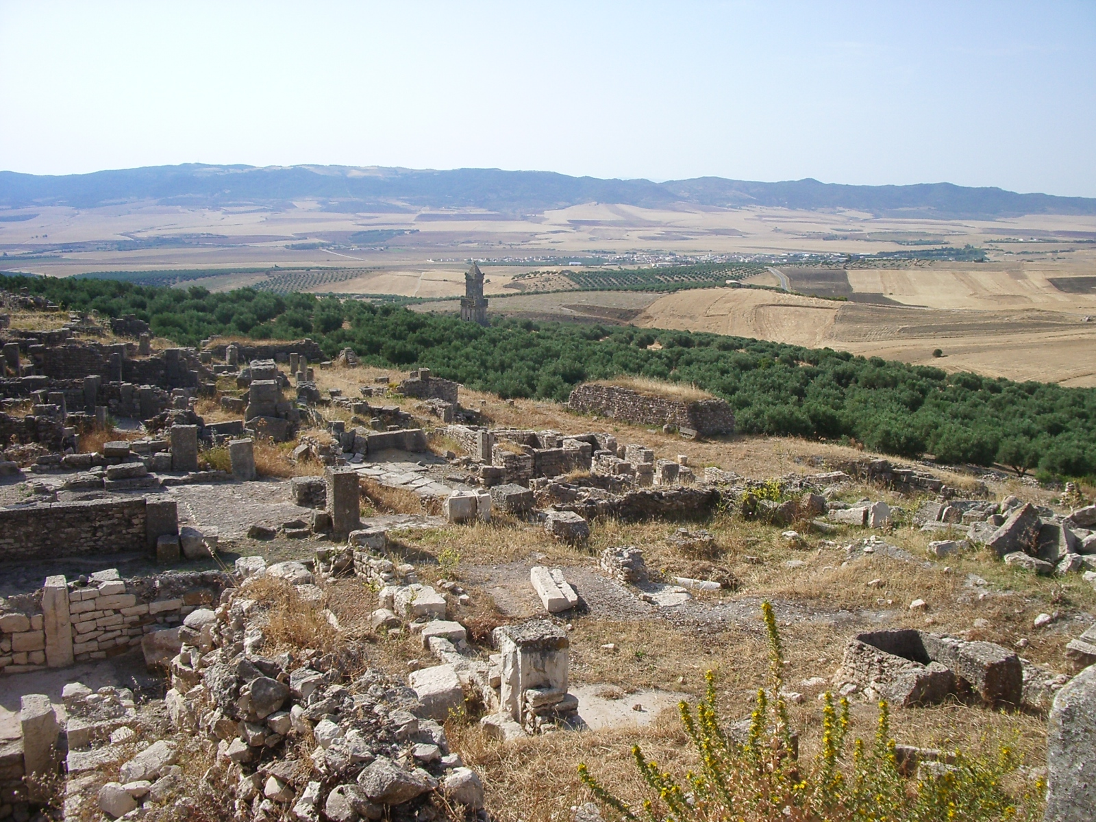 Dougga mausoleu